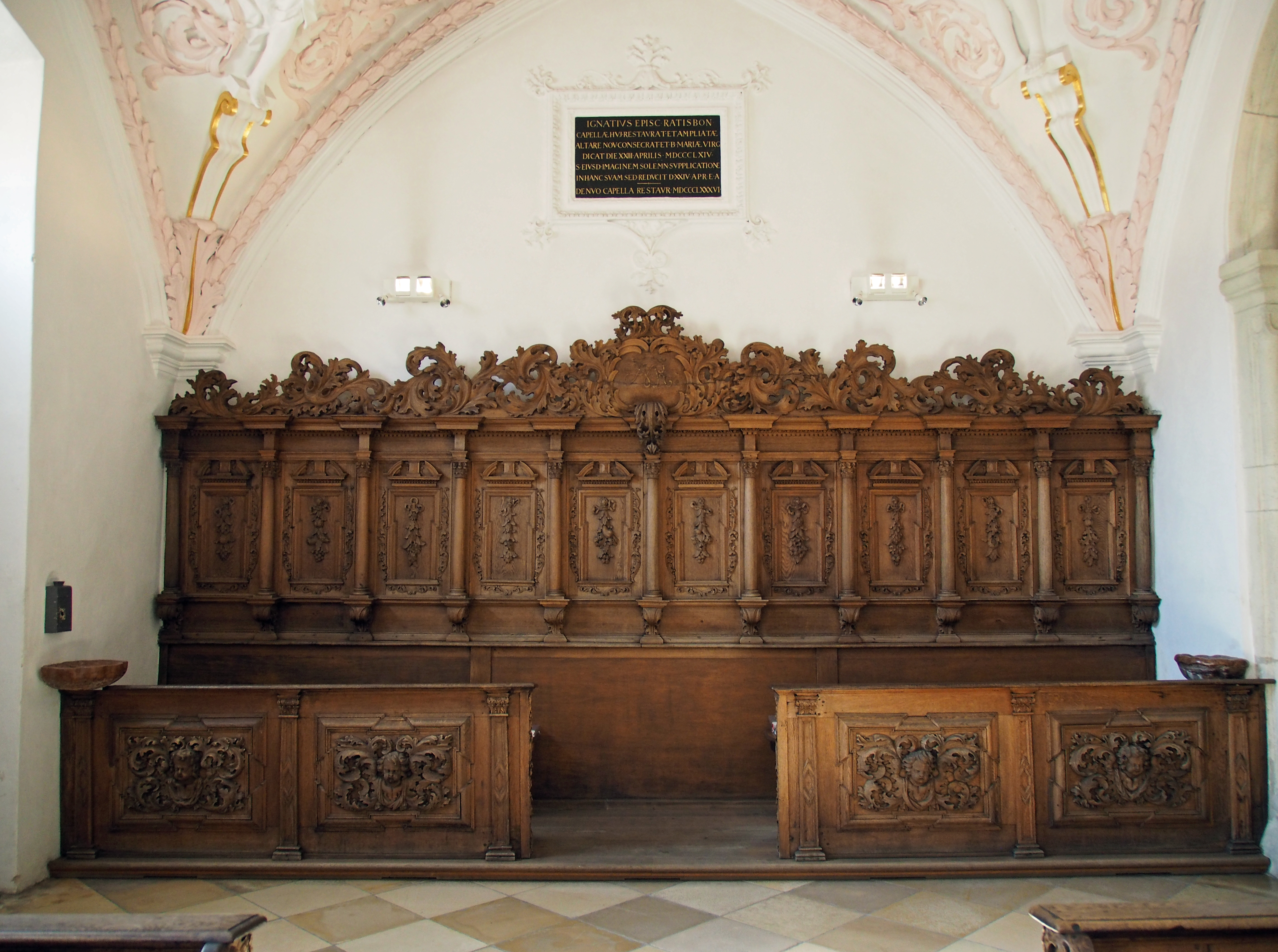 In der Gnadenkapelle der Stiftskirche Unserer Lieben Frau zur Alten Kapelle Regensburg